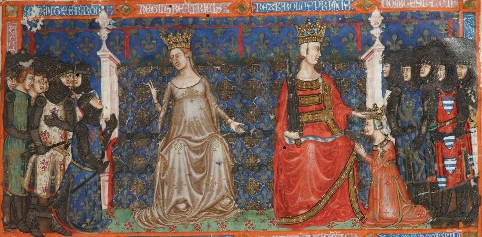 Beatrix Provensálská a Karel I. z Anjou